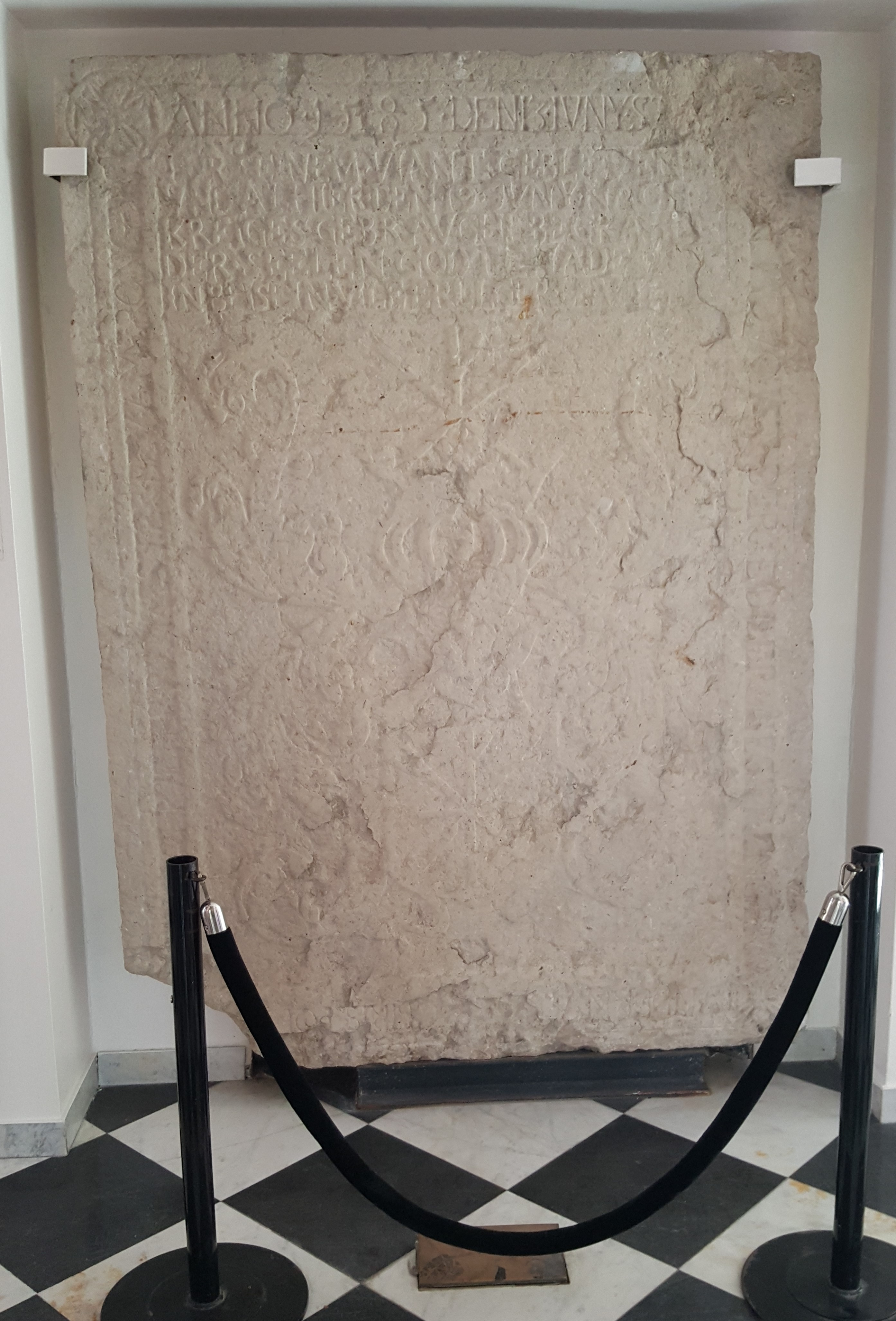 Grafsteen van Ritmeester in Staatse Dienst Christoffel van Kalckrueter. Gesneuveld in de Slag bij Amerongen 13 juni 1585.